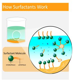 برای کوچک تر کردن قطرات، می توان از سورفکتانت استفاده کرد و آن را با فاز پیوسته یا پراکنده مخلوط کرد.